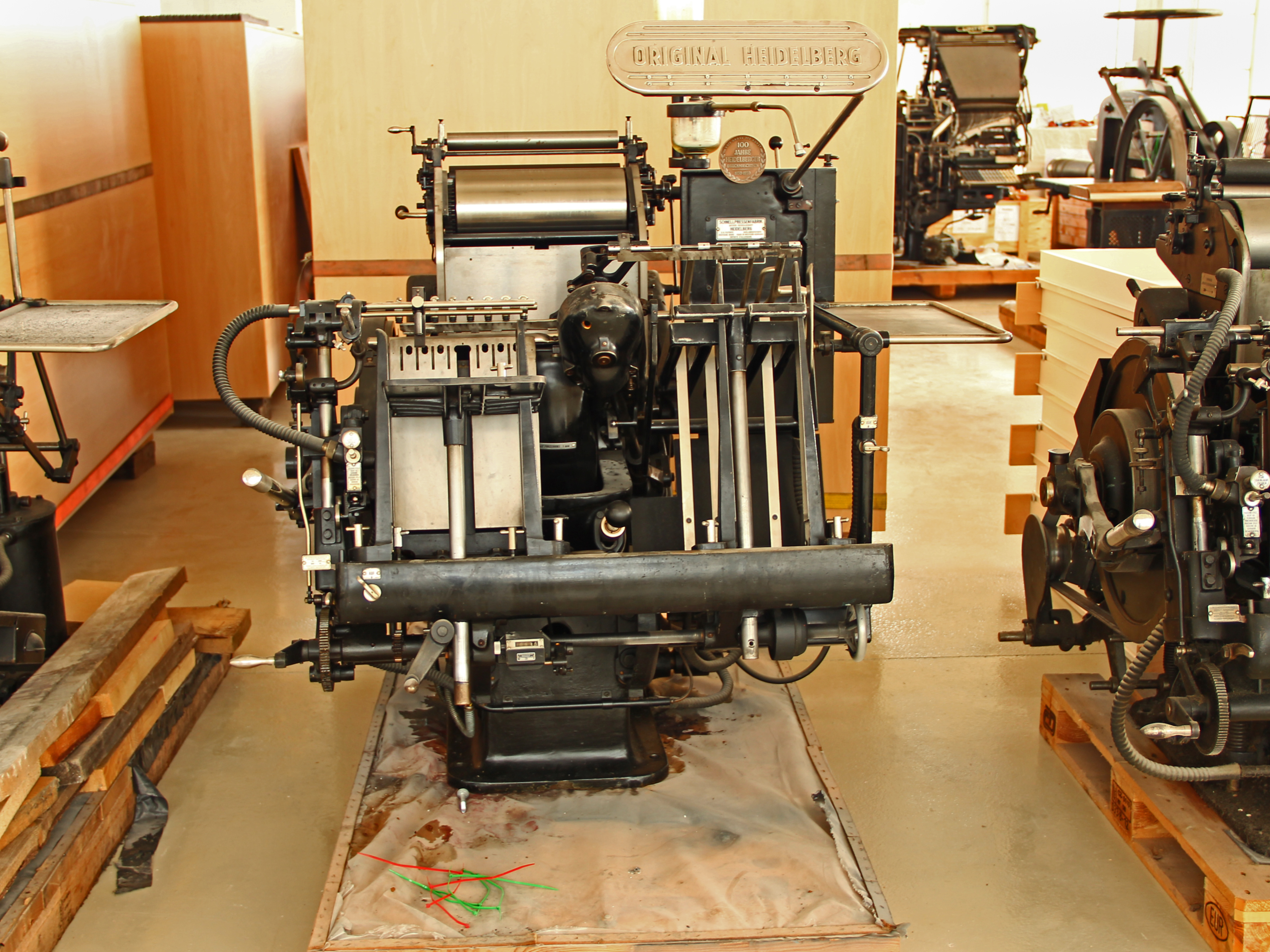 Gmünd - Denkmalpfad Dieses Bild wurde anlässlich des österreichischen Tags des Denkmals 2012 in Niederösterreich eingereicht.